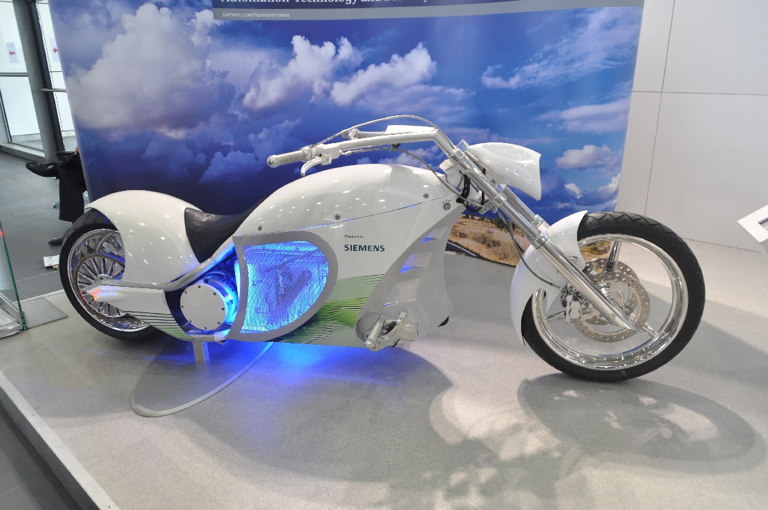 Hannover-Messe April 2012 Dieses Foto entstand durch die Mithilfe des gemeinnützigen Vereins Skillshare bei der Akkreditierung als Fotograf. Infos unter skillshare.eu Skillshare e.V. ist ein eingetragener gemeinnütziger Verein zur Förderung der Bildung durch Unterstützung der Erstellung, Sammlung und Verbreitung so genannten freien Wissens. IBAN: DE16 8306 5408 0004 8850 66 BIC: GENODEF1SLR Bank: VR-Bank Altenburger Land